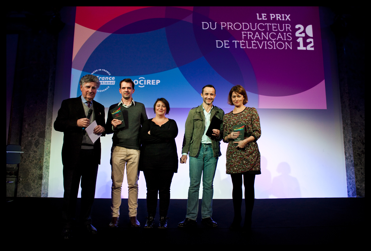 Lauréats du Prix Export 2012